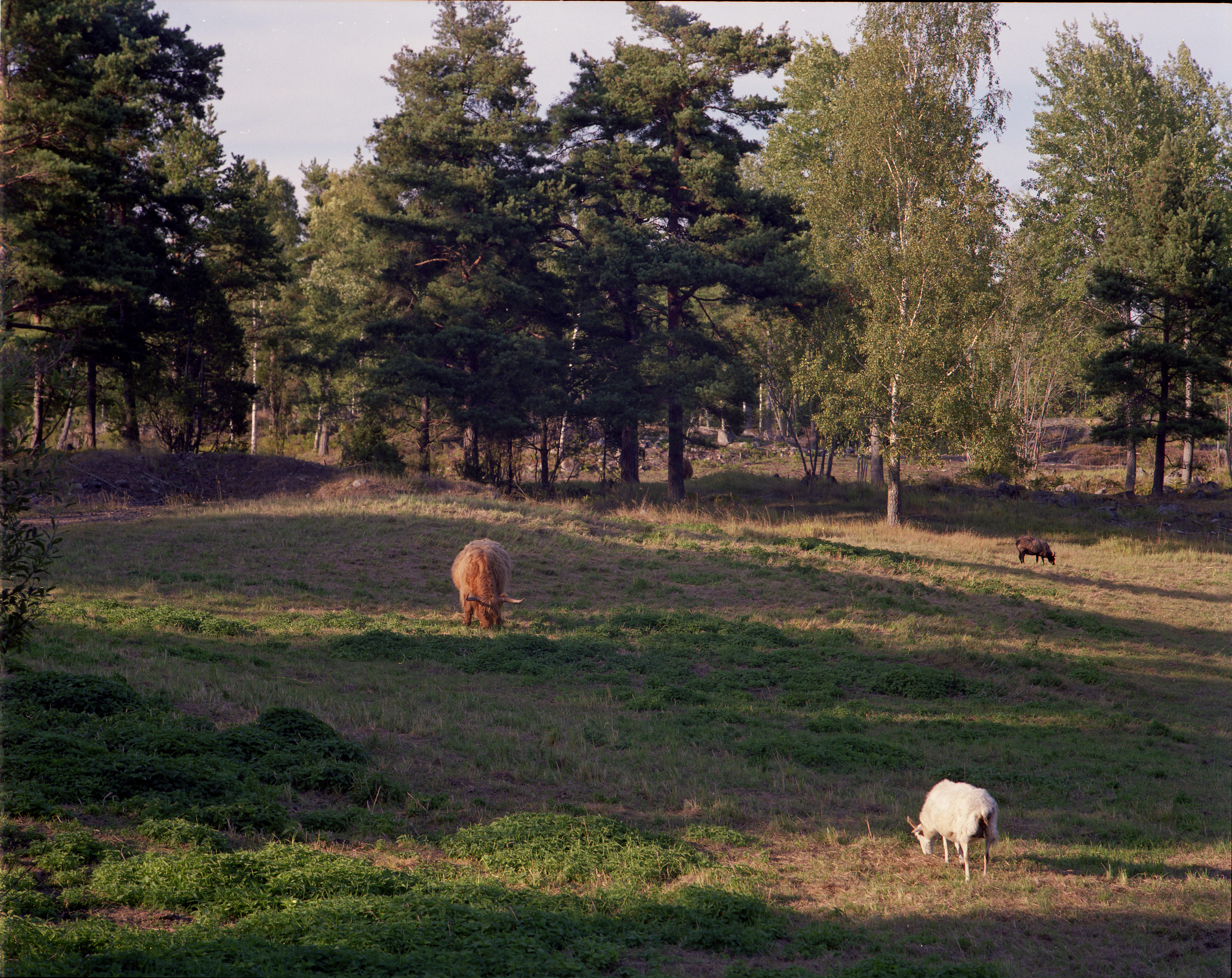 Koni Hexanon 180mm/4.5